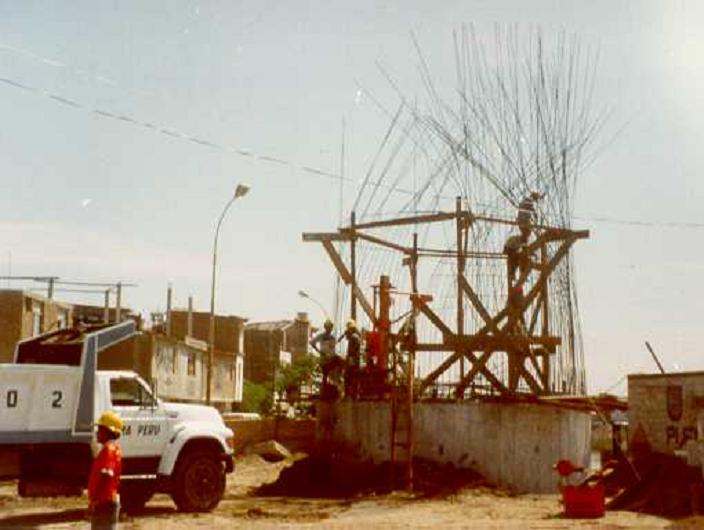 Construcción de un "Caisson" mientras que este se está hundiendo Puente Bolognesi, Piura, Perú, Vista externa del "Caisson" en fase de hundimiento. Proyectista del Puente: C.Lotti & Associati - Roma Director de Proyecto: Ing. Alfredo Bianco Calculista responsable: Ing. Doumitrescu Autor: Alfredobi Lugar: Piura, Perú Fecha: Aproximada 2001